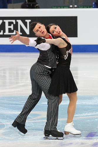 Шарлин Гинар и Марко Фаббри (Италия) на чемпионате Европы по фигурному катанию 2012